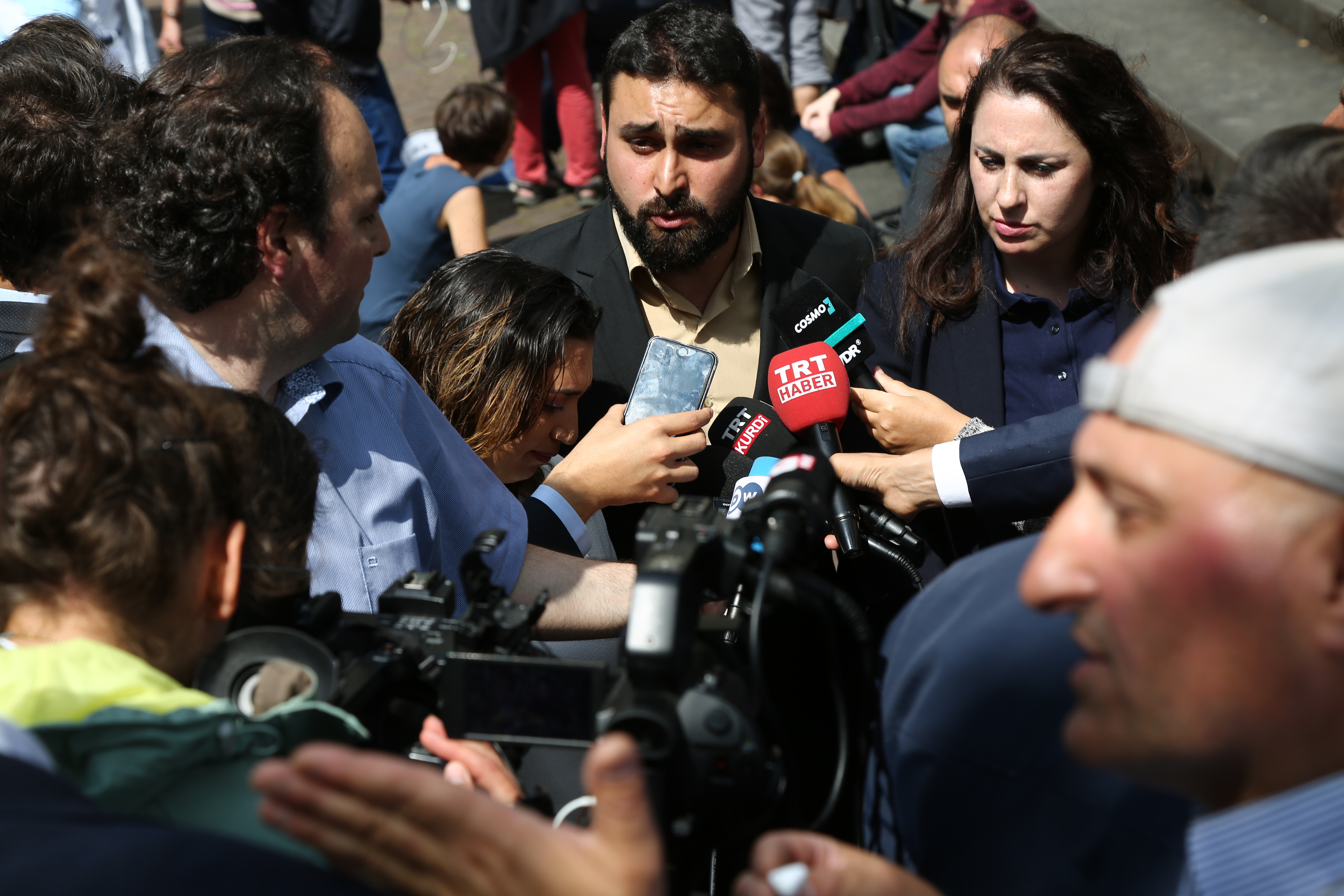 "Kein Schlussstrich" - Demonstration zur Urteilsverkündung im NSU-Prozess am 11. Juli 2018 in München